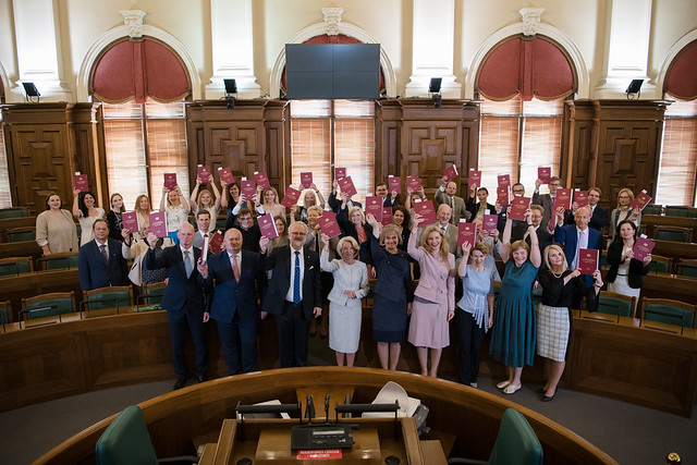 2019.gada 11.maijs. Saeimas namā svinīgā pasākumā atver grāmatu “Latvijas Republikas Satversmes komentāri. V nodaļa Likumdošana”.